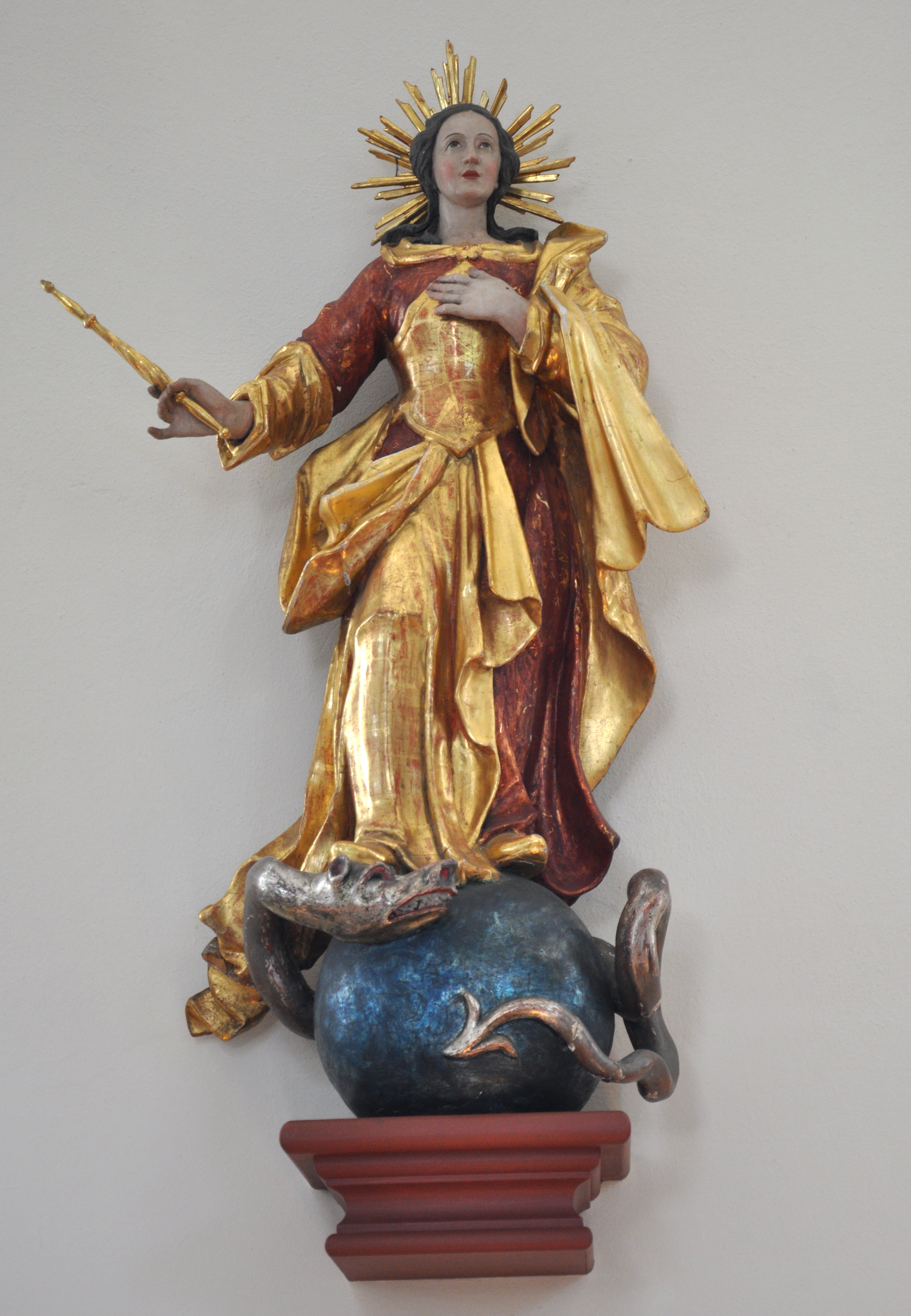 Pfarrkirche St. Johannes Baptist, Wilhelmskirch, Gemeinde Horgenzell Skulptur "Maria immaculata"